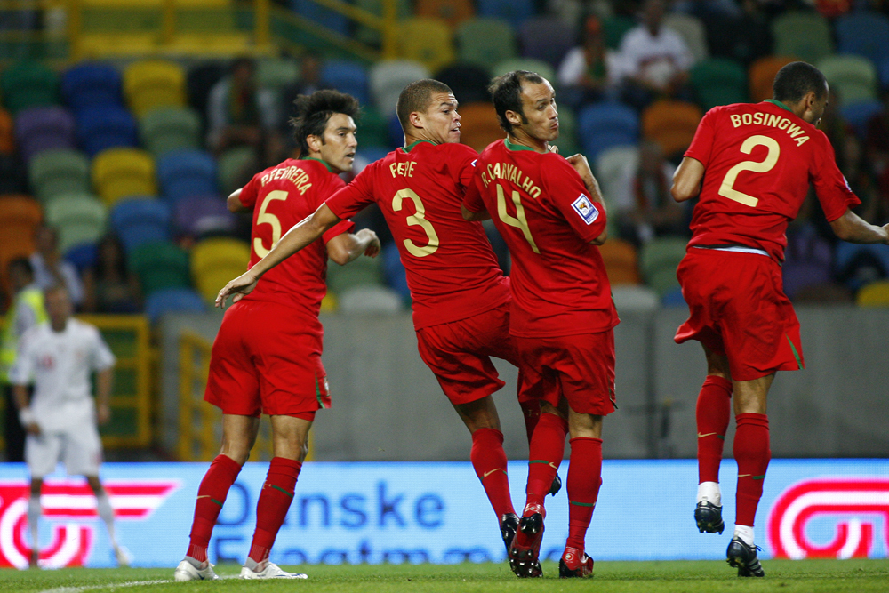 Paulo Ferreira (5),Pepe (3),Ricardo Carvalho (4), Bosingwa (2); Portugal 2-3 Denmark, Lisbon September 10 2008